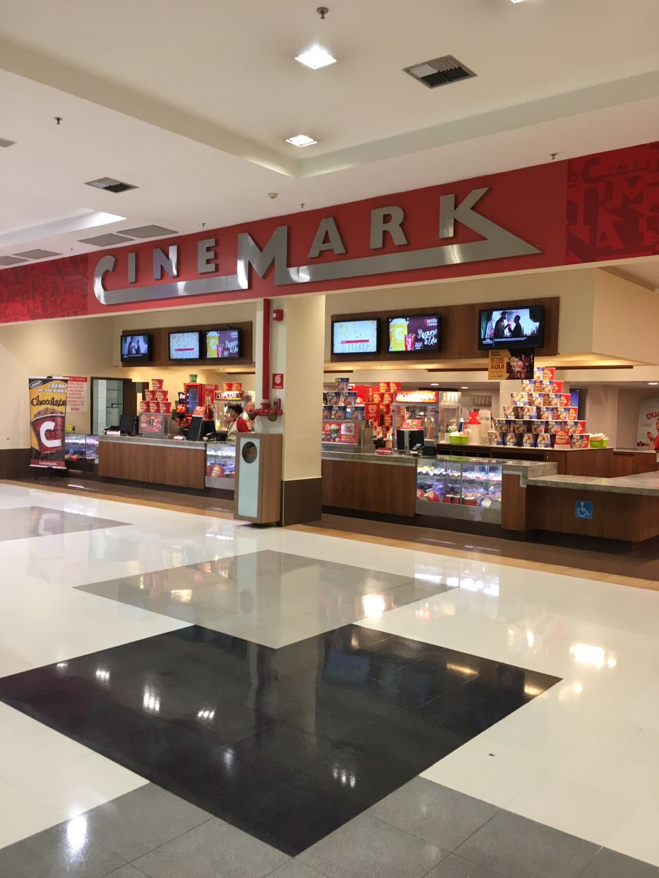 Vista da fachada do Cinemark Raposo Shopping